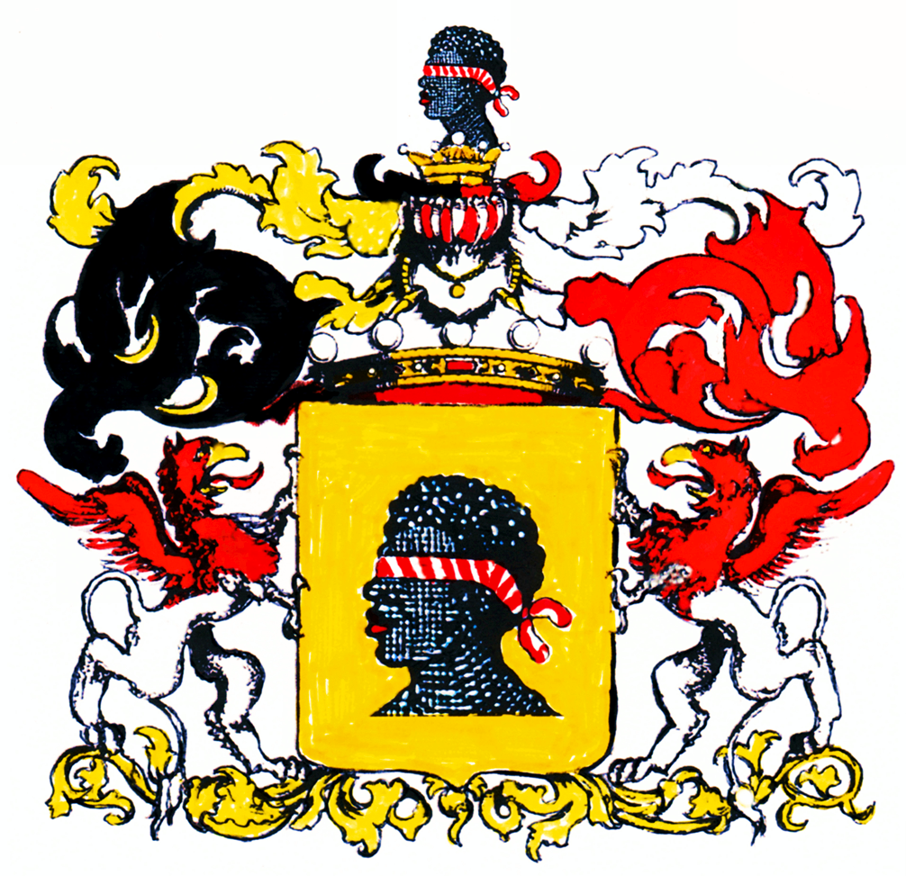 Wappen der Freiherrn von Teuchert 1859, erstellt nach Textvorlage